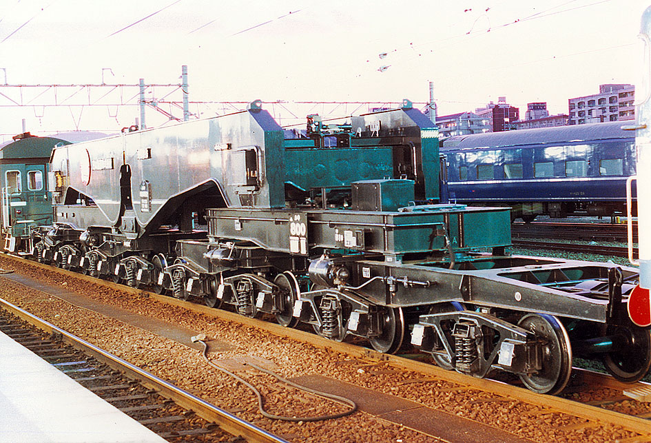 シキ800